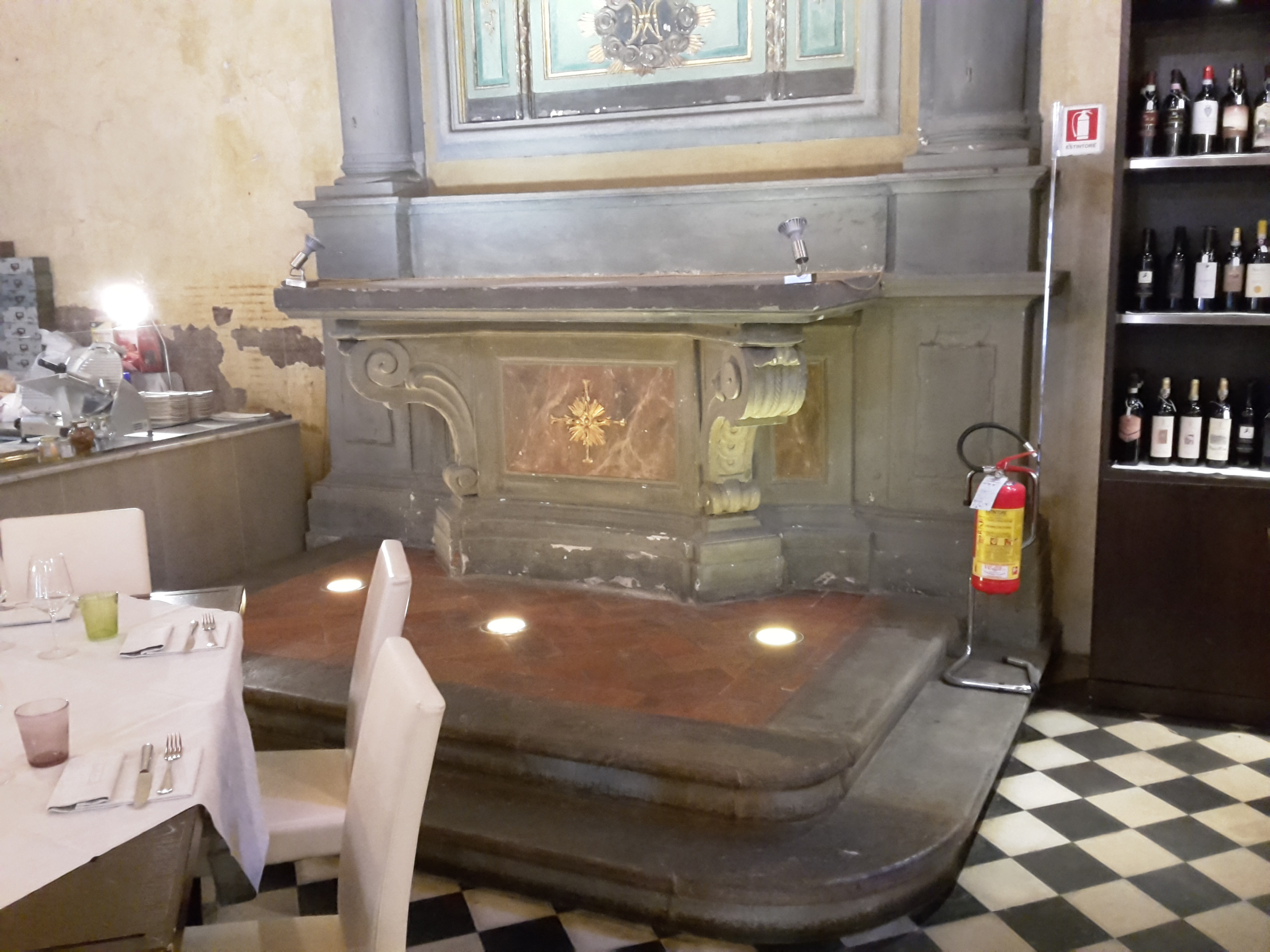 Altare maggiore, sopra il quale è esposta l'immagine miracolosa detta Madonna del Giglio, che dà il nome alla chiesa ed alla strada. Attualmente la chiesa è sconsacrata ed in uso a privati come locale di ristorazione.